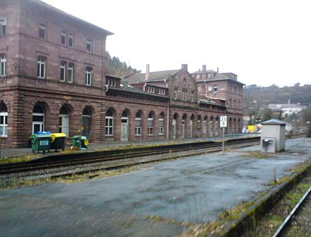 Der alte Bahnhof Calw mit den 2 Bahnsteigen; Gleis direkt am Bahnhof das noch von Nagoldtalbahn befahrene.